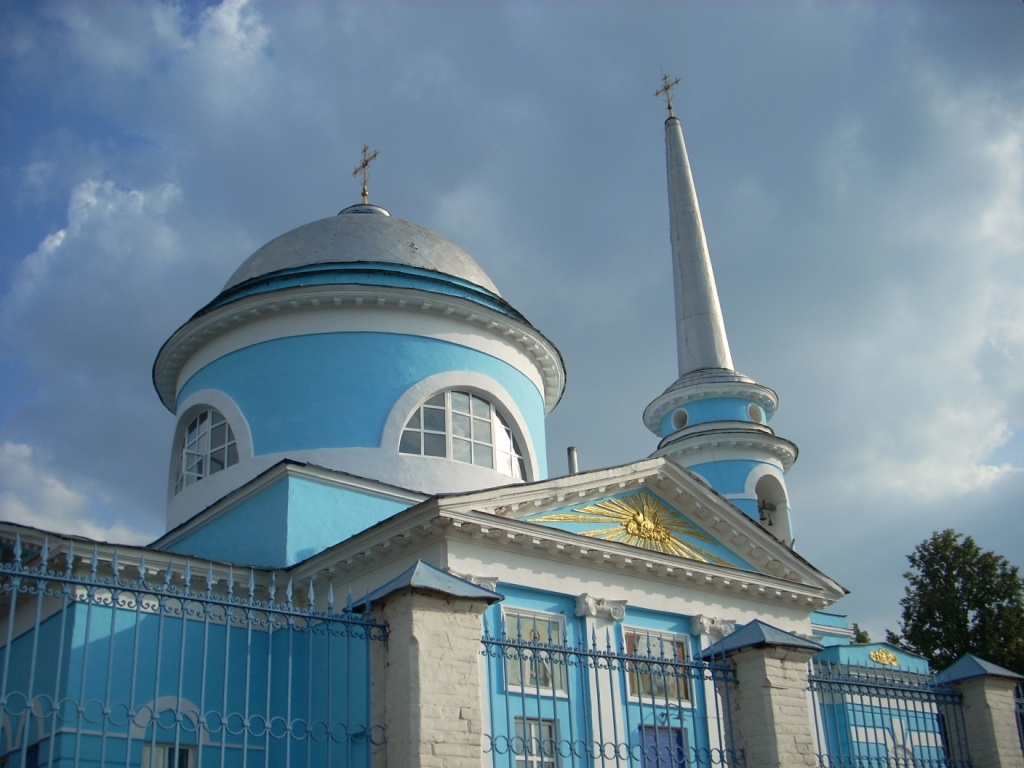 Успенская церковь в Нижних Деревенках